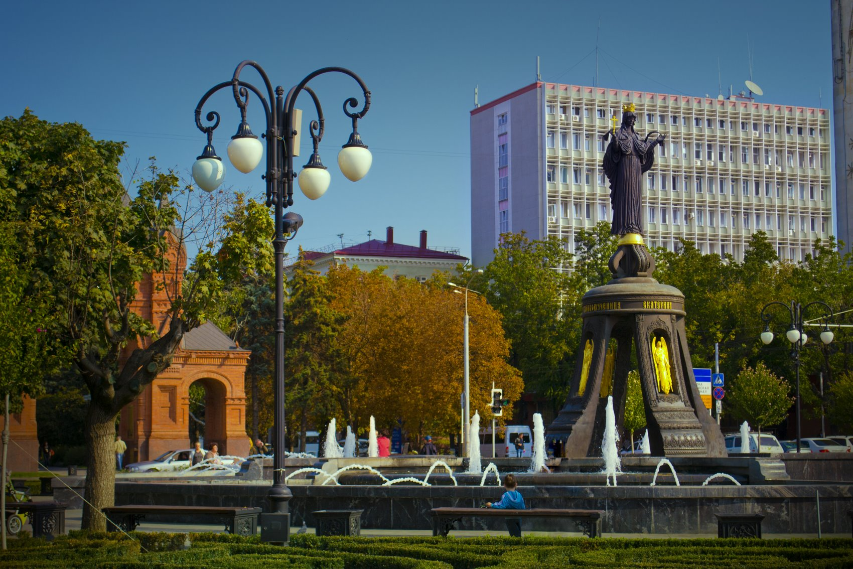 Архитектурный ансамбль на бульваре ул. Красная: Александровская арка и памятник Св. Екатерине